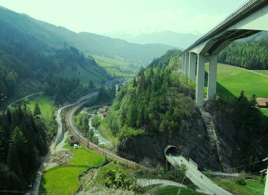 Panoramica dell'opera 6, Tenne